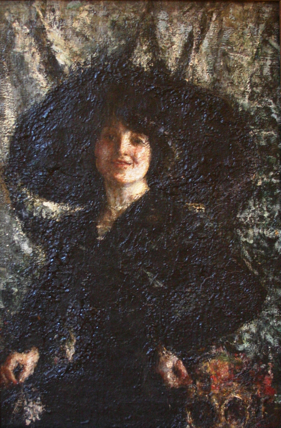 Castel Nuovo - Nápoles